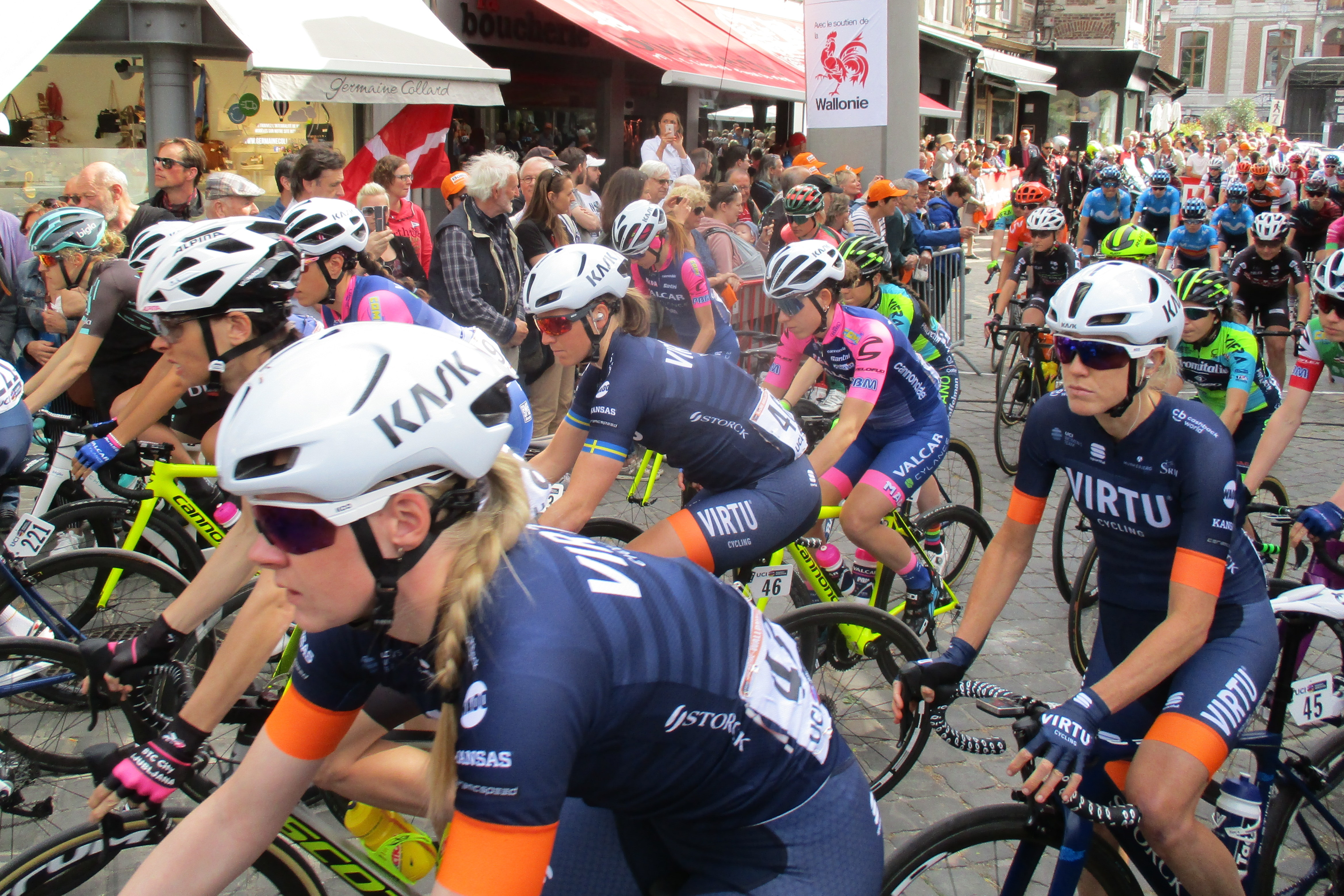 Start van de Waalse Pijl 2019 voor vrouwen in Huy